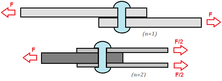 Fallo de roblones